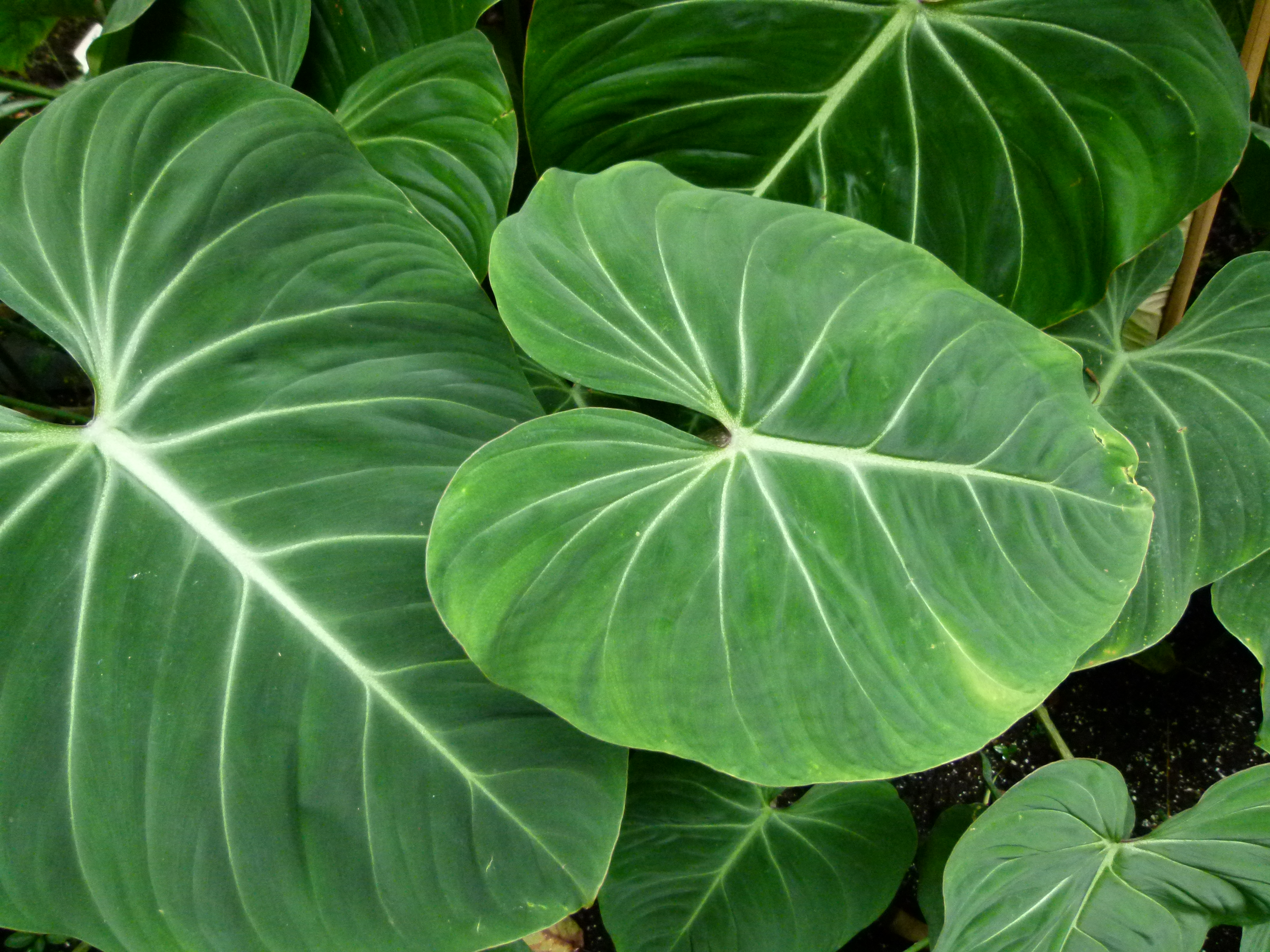 Photos taken summer 2011 in the greenhouse of the park Planten un Blomen in Hamburg. This park used to be the botanical garden of the city. Fotos sind von Sommer 2011 in dem Gewächshaus von dem Park Planten un Blomen von Hamburg genommen worden. Dieser Park war früher der botanische Garten. Photos prises l'été 2011 dans les serres du Parc Planten un Blomen de Hambourg. Ce parc était autrefois le jardin botanique de la ville.